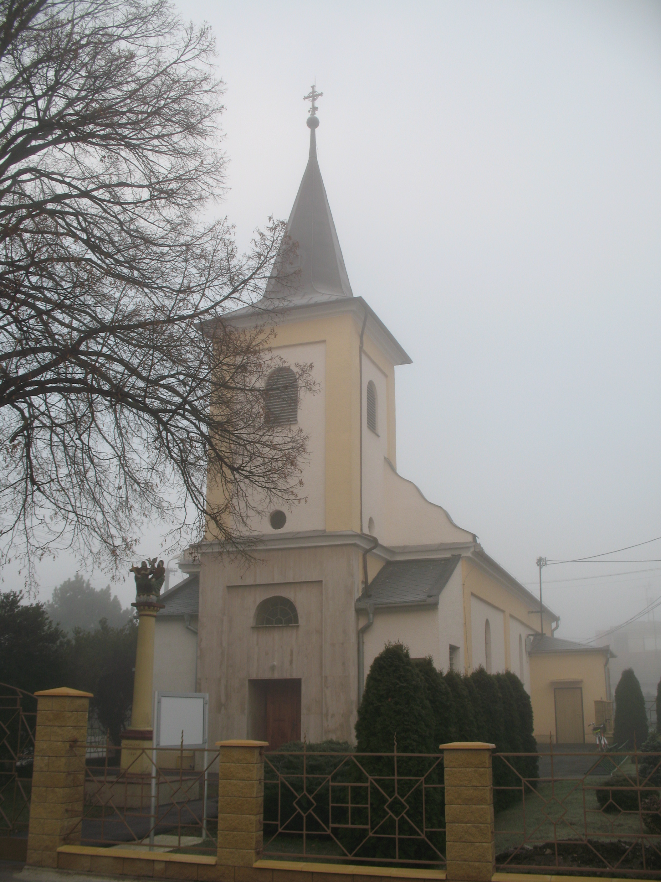 Salgó